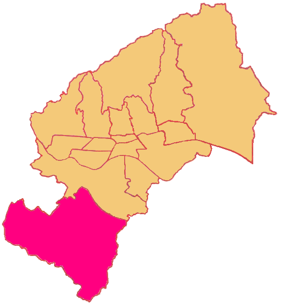 Map of Brezovica District in Zagreb (Gradska četvrt Brezovica)